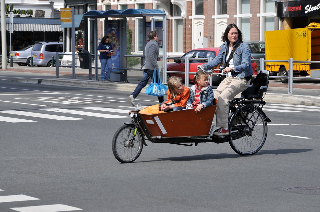 Bakfietsmoeder op de Laan van Nieuw Oost-Indië in Den Haag